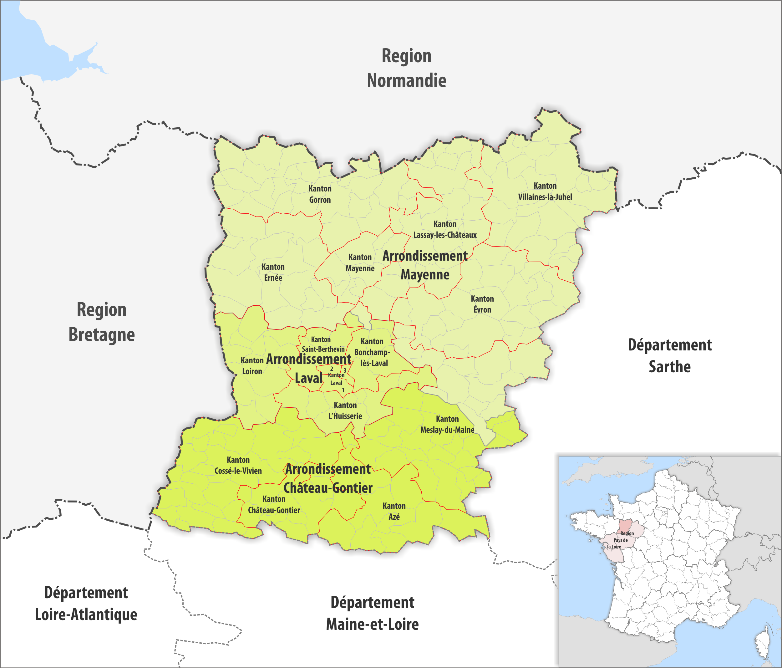 Gemeinden, Kantone und Arrondissemente im Departement Mayenne